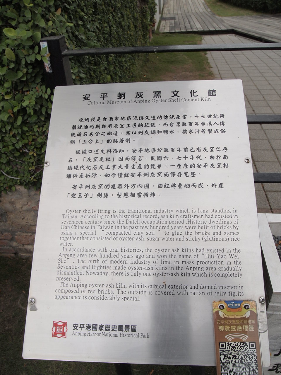 安平港國家歷史風景區安平蚵灰窯文化館解說牌。